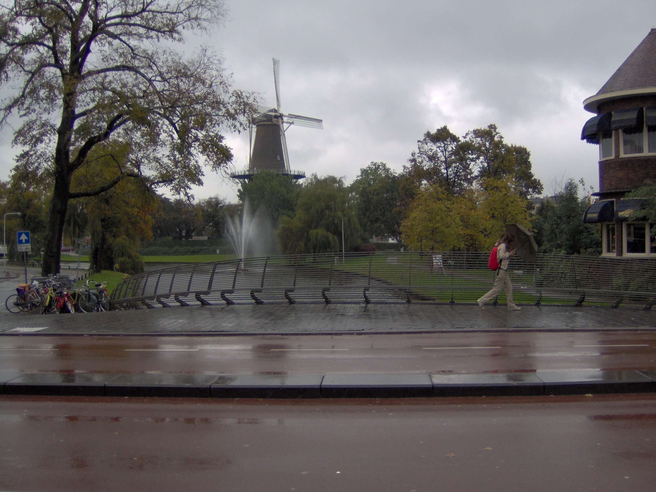 Windmill De Valk (The Falcon) in Leiden.